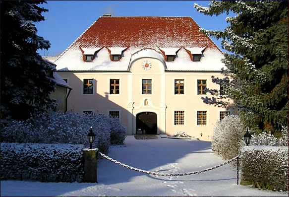 Das Schloss Holzhammer im Winter bei Schnee.